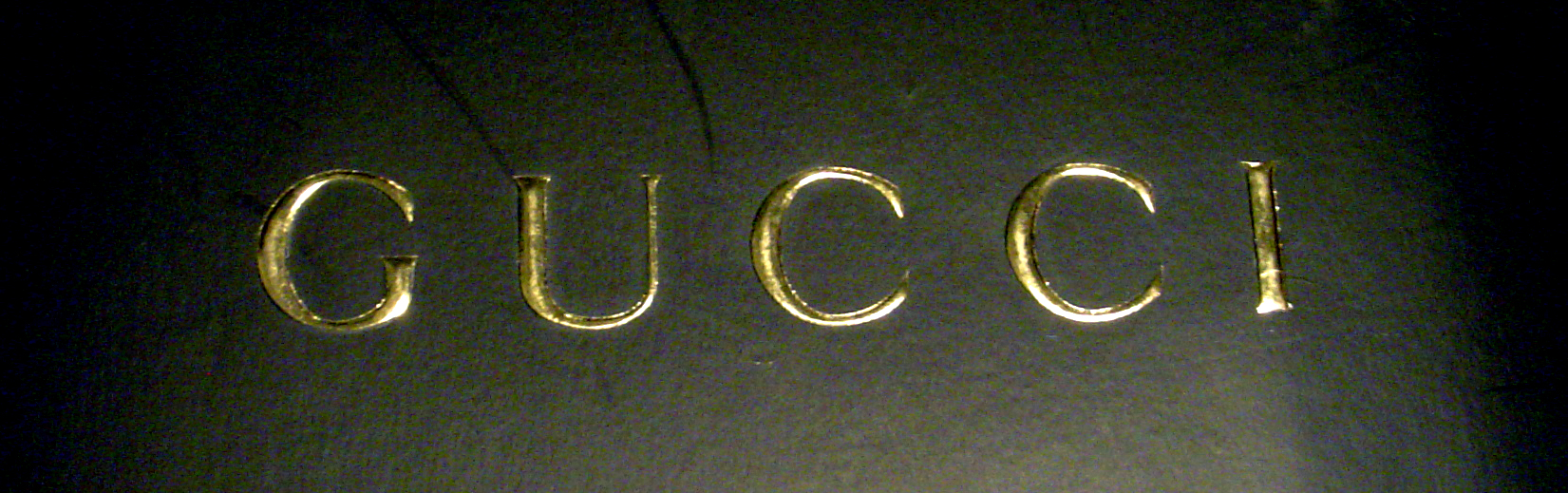 Zelfgemaakt van Gucci-schoenendoos. Kan misschien beroemd Gucci-motief ook wel fotograferen?